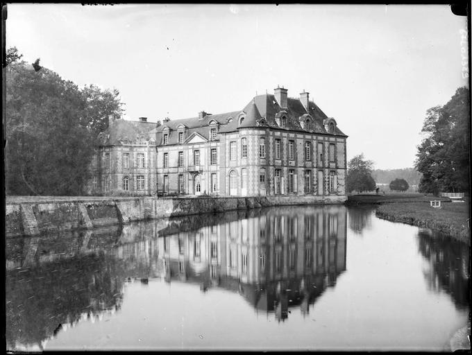 Château de Montigny-sur-Avre, Eure-et-Loir (France).